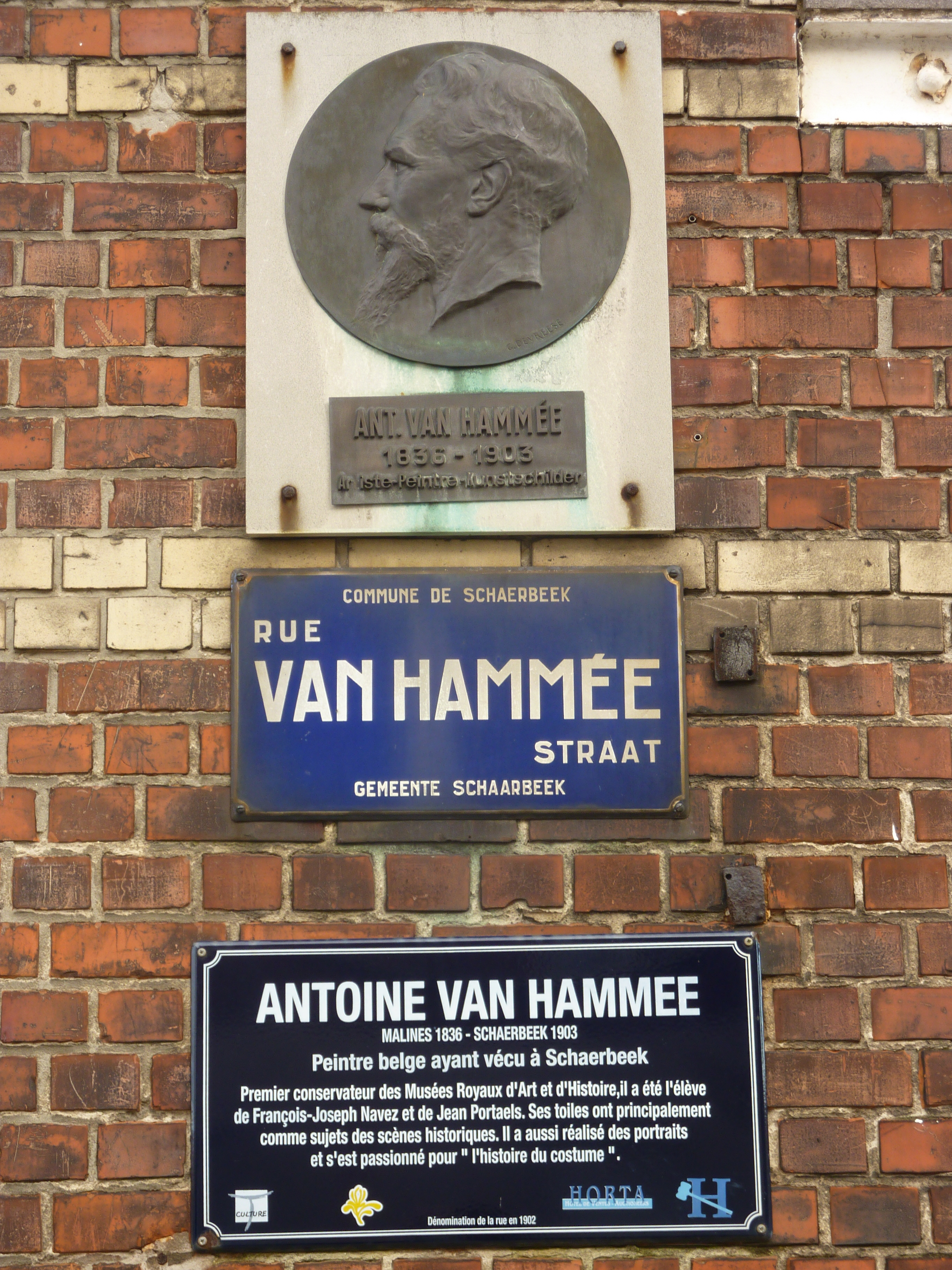 Plaque Antoine Van Hammée rue Van Hammée à Schaerbeek, Bruxelles, Belgique.